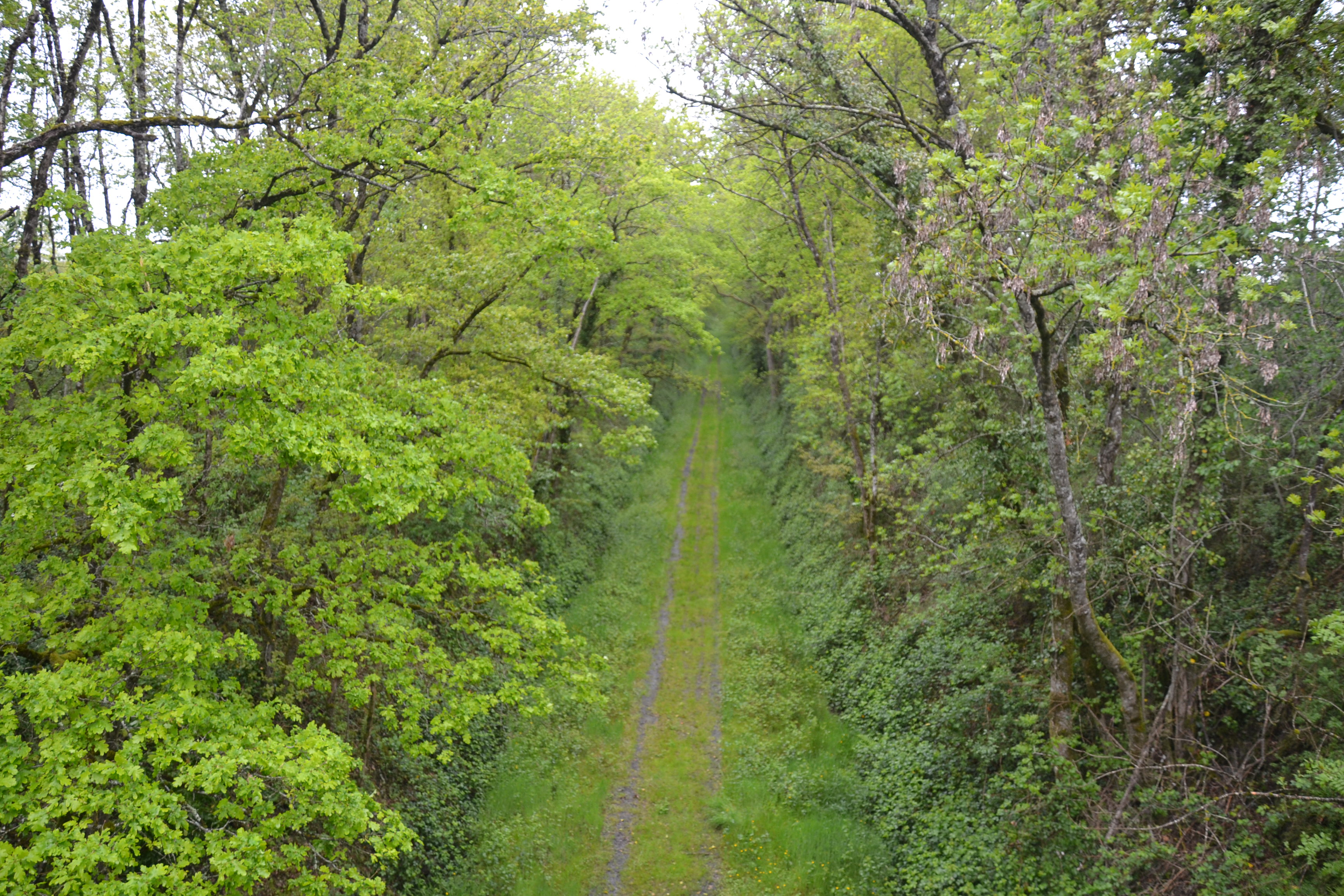 Ancienne ligne de Mignaloux - Nouaillé à Bersac, secteur de Droux (Haute-Vienne, France).